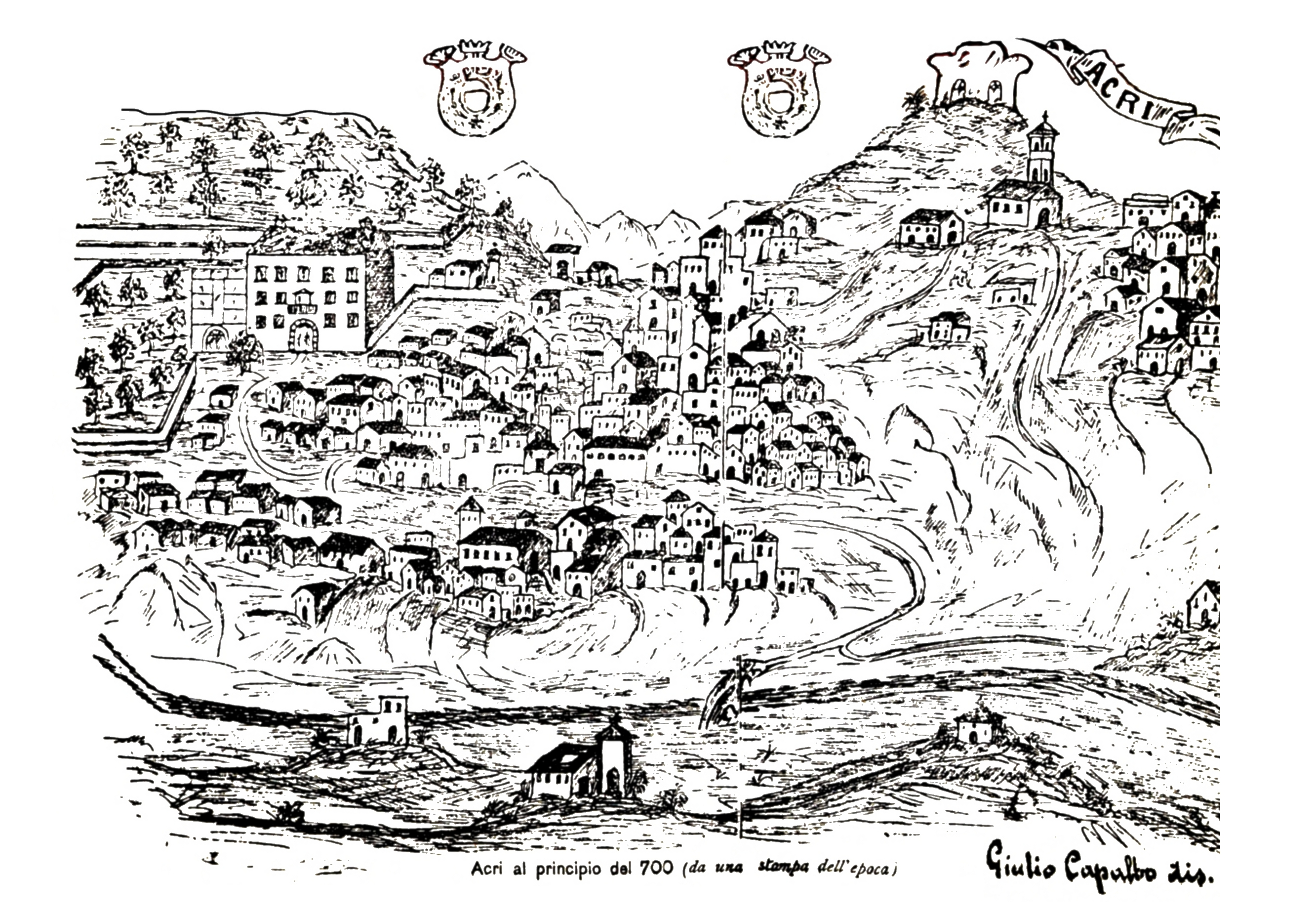 Disegno di che raffigura Acri,nel 1700 ad opera di Giulio Capalbo nel 1908 a sua volta copiato da uno più antico.